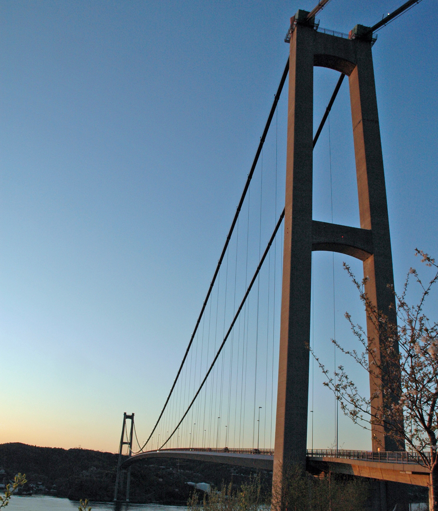 Askøybroen